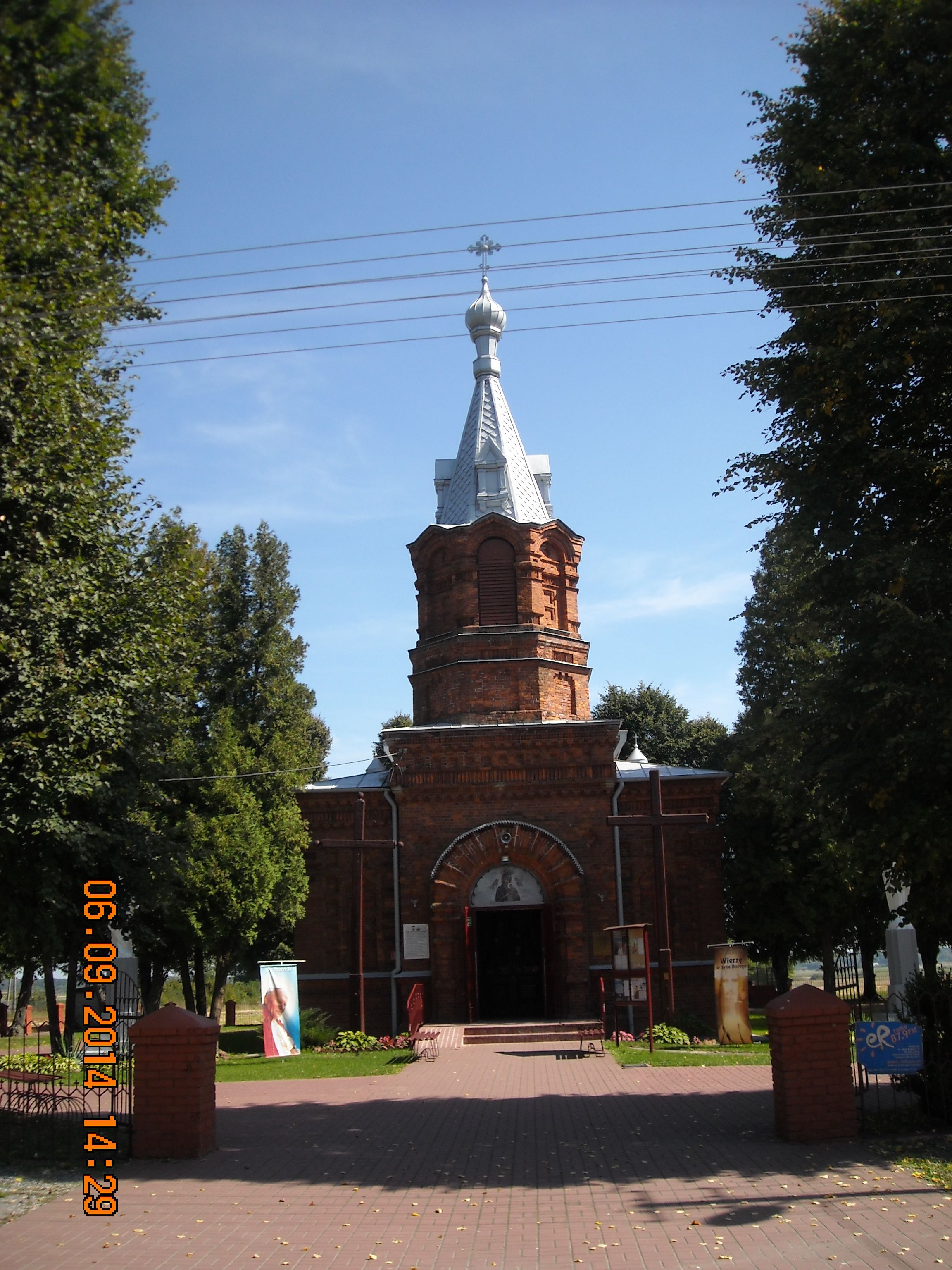 Czułczyce - dawna cerkiew prawosławna p.w. św. Aleksego, ob. rzymskokatolicki kościół parafialny pw. św. Rocha, 1905 r.